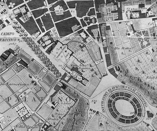 La collina della Velia nella "Nuova Topografia di Roma" di G.B. Nolli (1748)